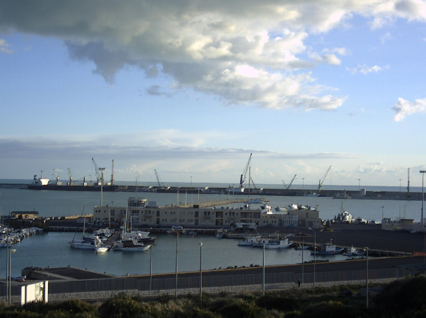 Porto di Pozzallo, Ragusa, Sicilia, Italia.